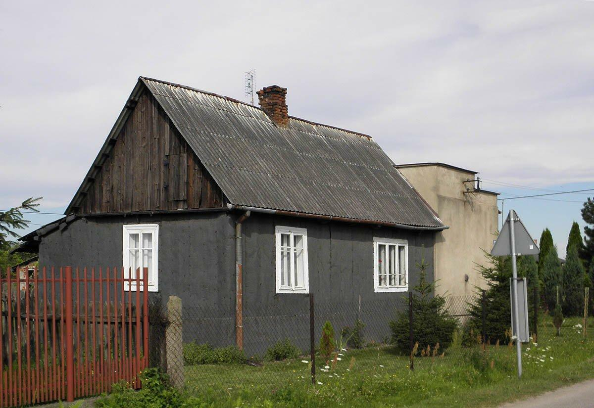 Rajec Poduchowy 52